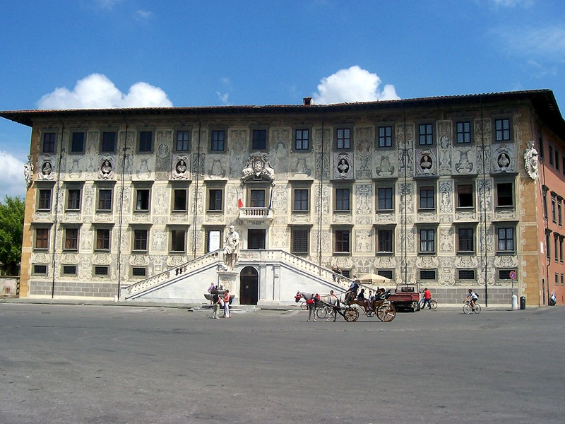 Pisa - Palazzo dei Cavalieri